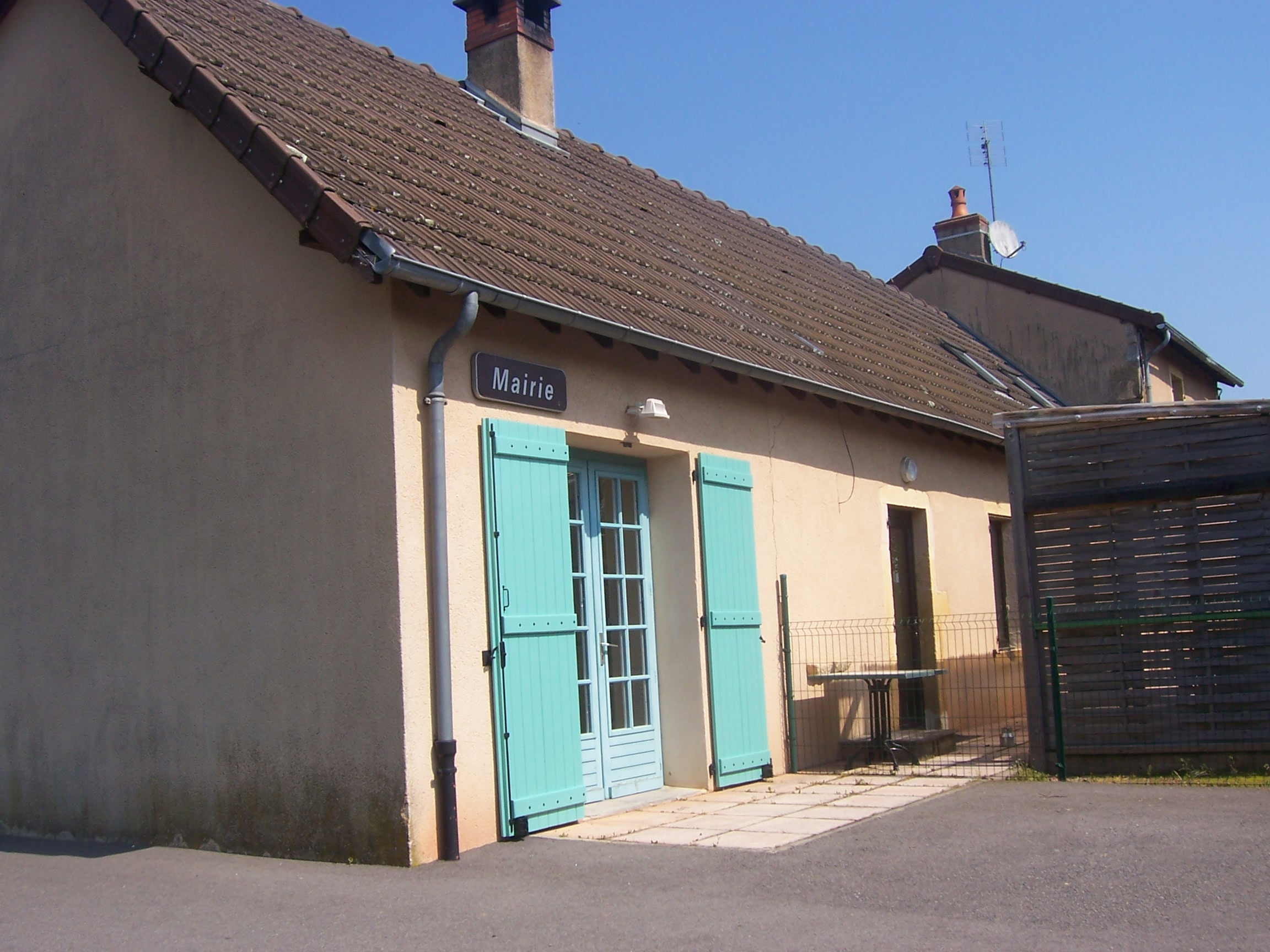 Mairie de Hautefond